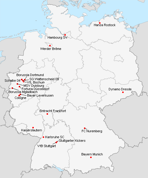 Répartition des clubs en 1.Bundesliga 1991-1992.